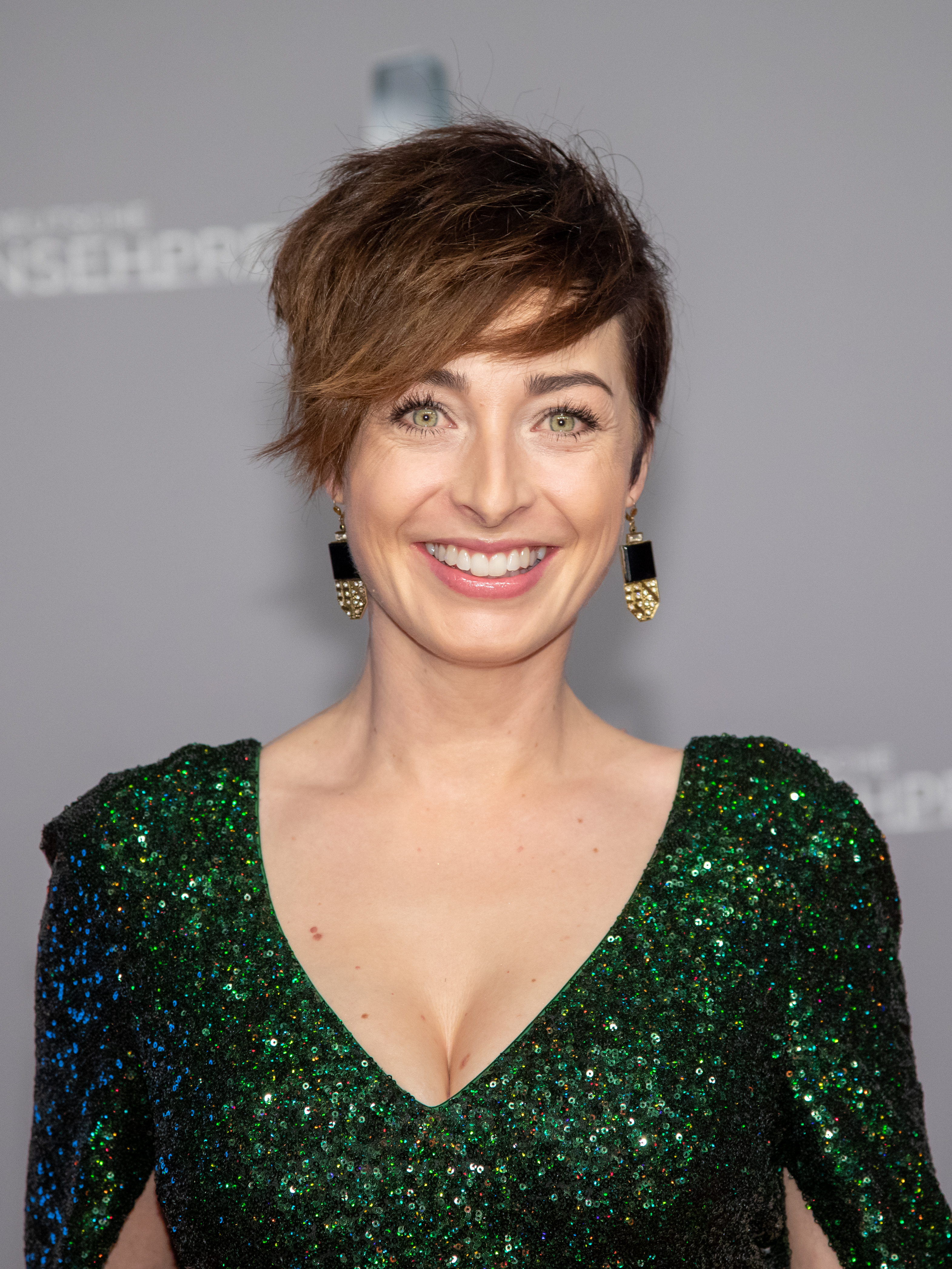 Kathy Weber beim Deutschen Fernsehpreis 2019 in der Düsseldorfer Rheinterrasse